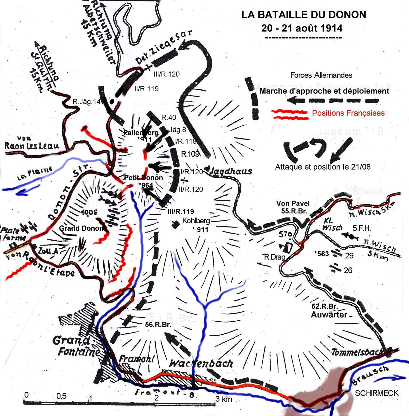 Schéma des mouvements des 20 et 21 août 1914 au Donon